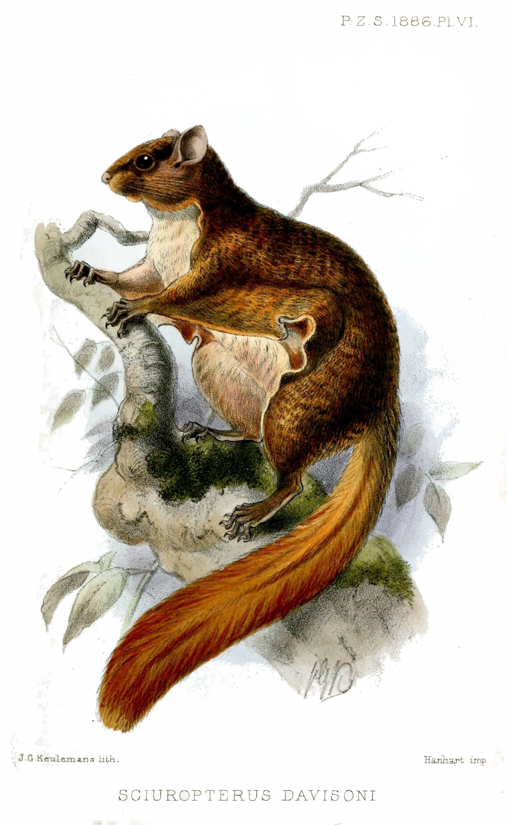 Sciuropterus davisoni == Iomys horsfieldii davisoni